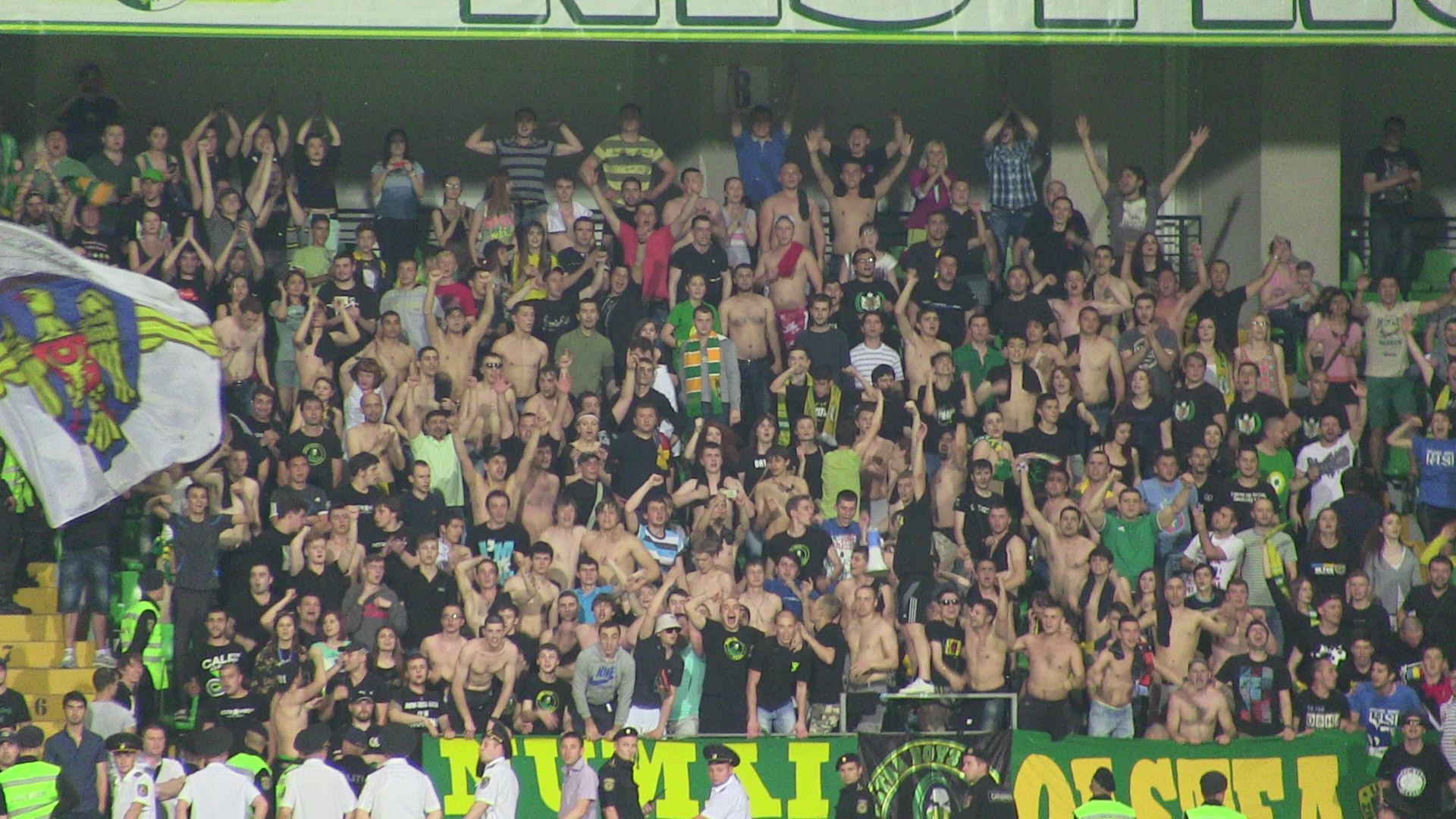 Finala Cupei Moldovei-Orange 2014